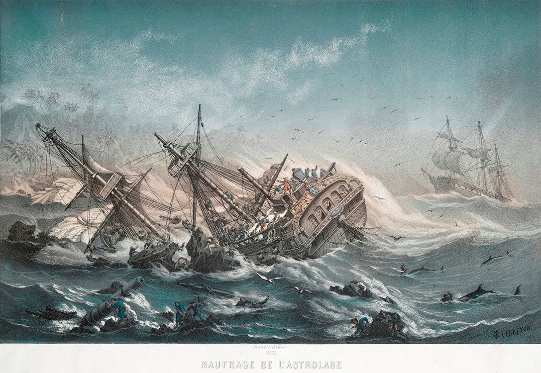 Naufrage de l’Astrolabe en 1788 sur les récifs de l’île de Vanikoro lors d'une tempête. En arrière plan, la Boussole sur le point de s'échouer aussi. Expédition La Pérouse (1785-1788). Dessin réalisé après la découverte du naufrage en 1827.